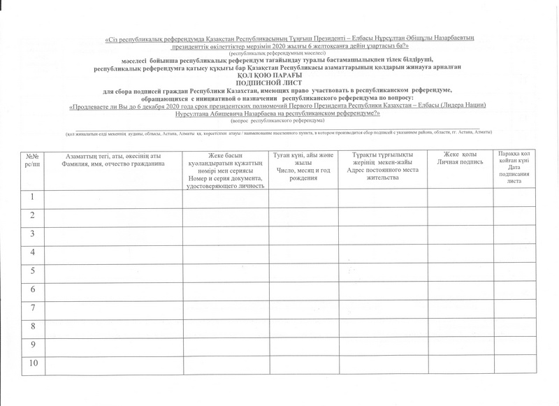 Подписной лист для сбора подписей граждан о назначении референдума по продлению полномочий президента Казахстана Нурсултана Назарбаева до 2020 года